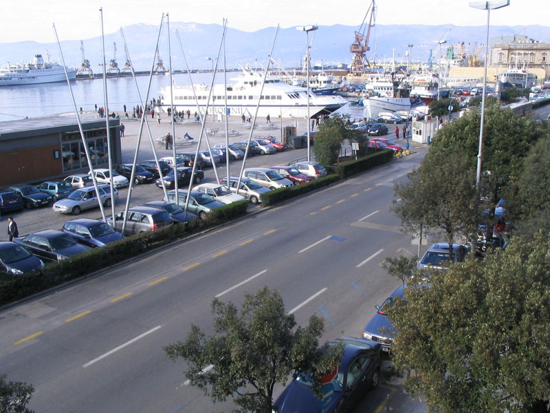 Rijeka, luka